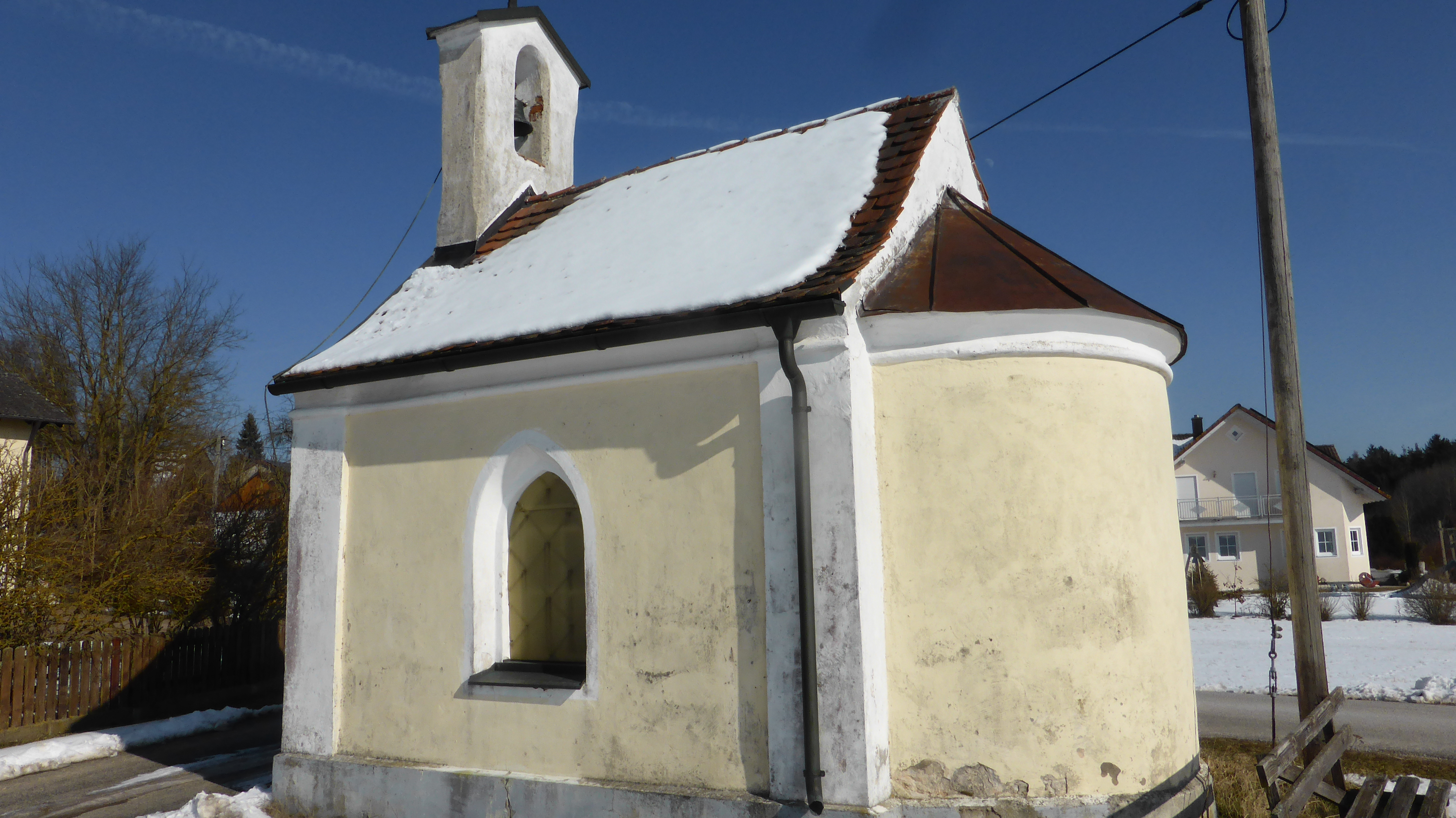 Die katholische Ortskapelle St. Maria in Kleinmittersdorf bei Hohenfels